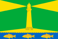 Флаг Шабельского сельского поселения, Краснодарский край, Россия.